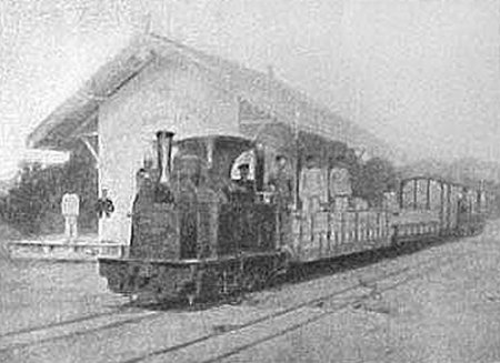 Estação de Sapucaia, no porto de Sapucaia, que é o ponto de partida da E.F. Benjamin Constant